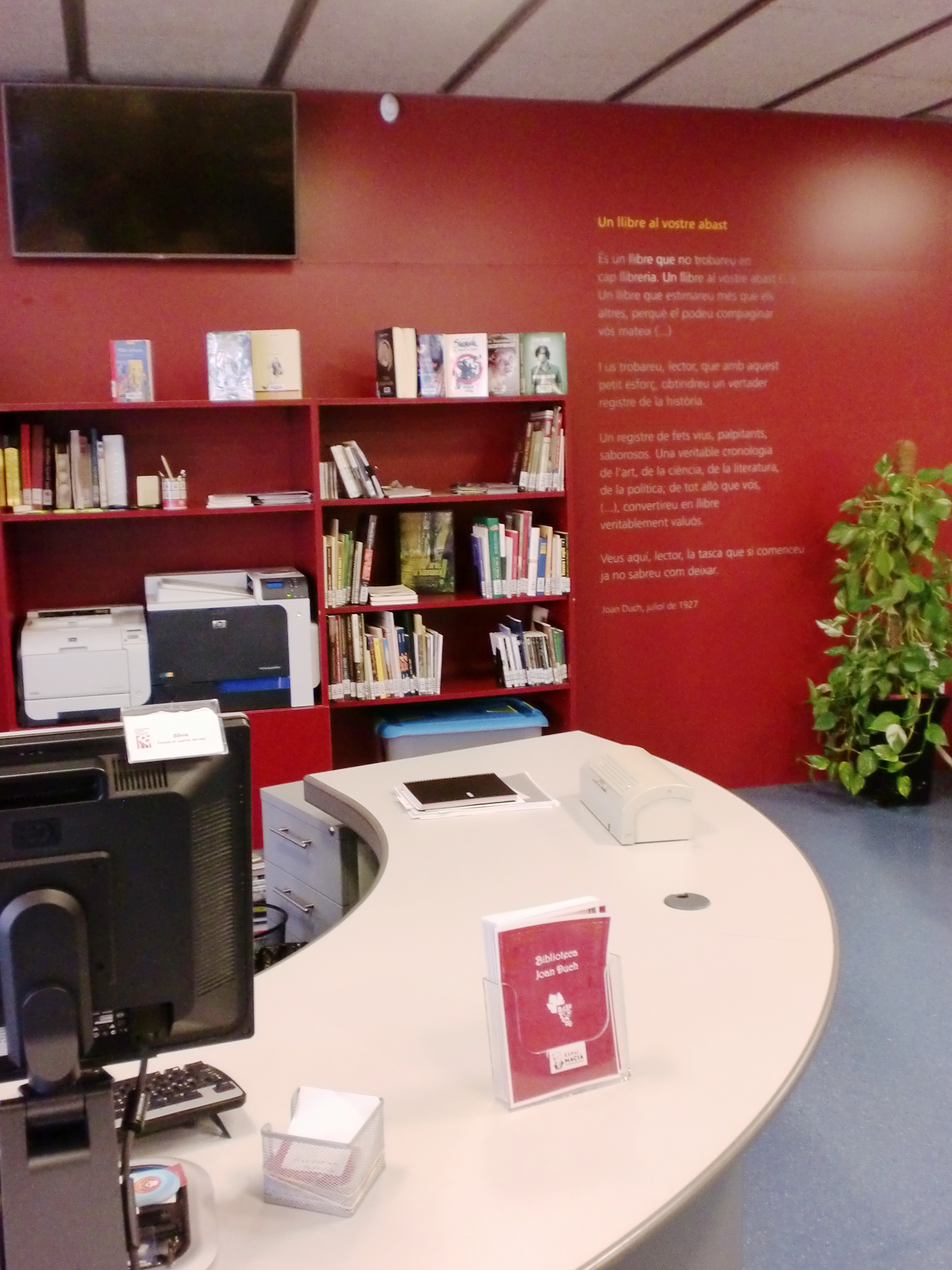 Imatge de la biblioteca de Juneda en la que es veu retolat a la paret el poema de Joan Duch "Un llibre al vostre abast"